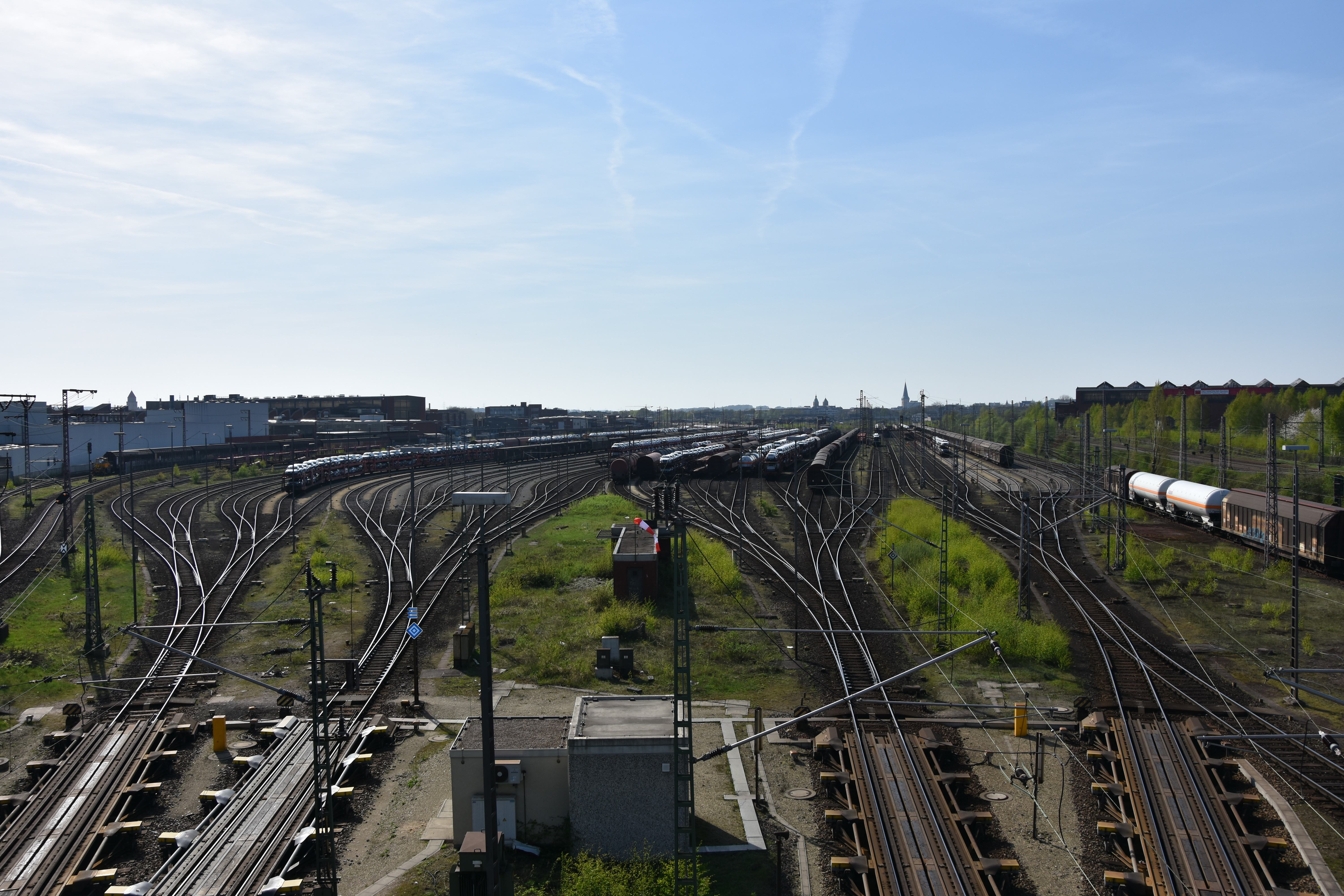 Blick über den Rangierbahnhof Osnabrück